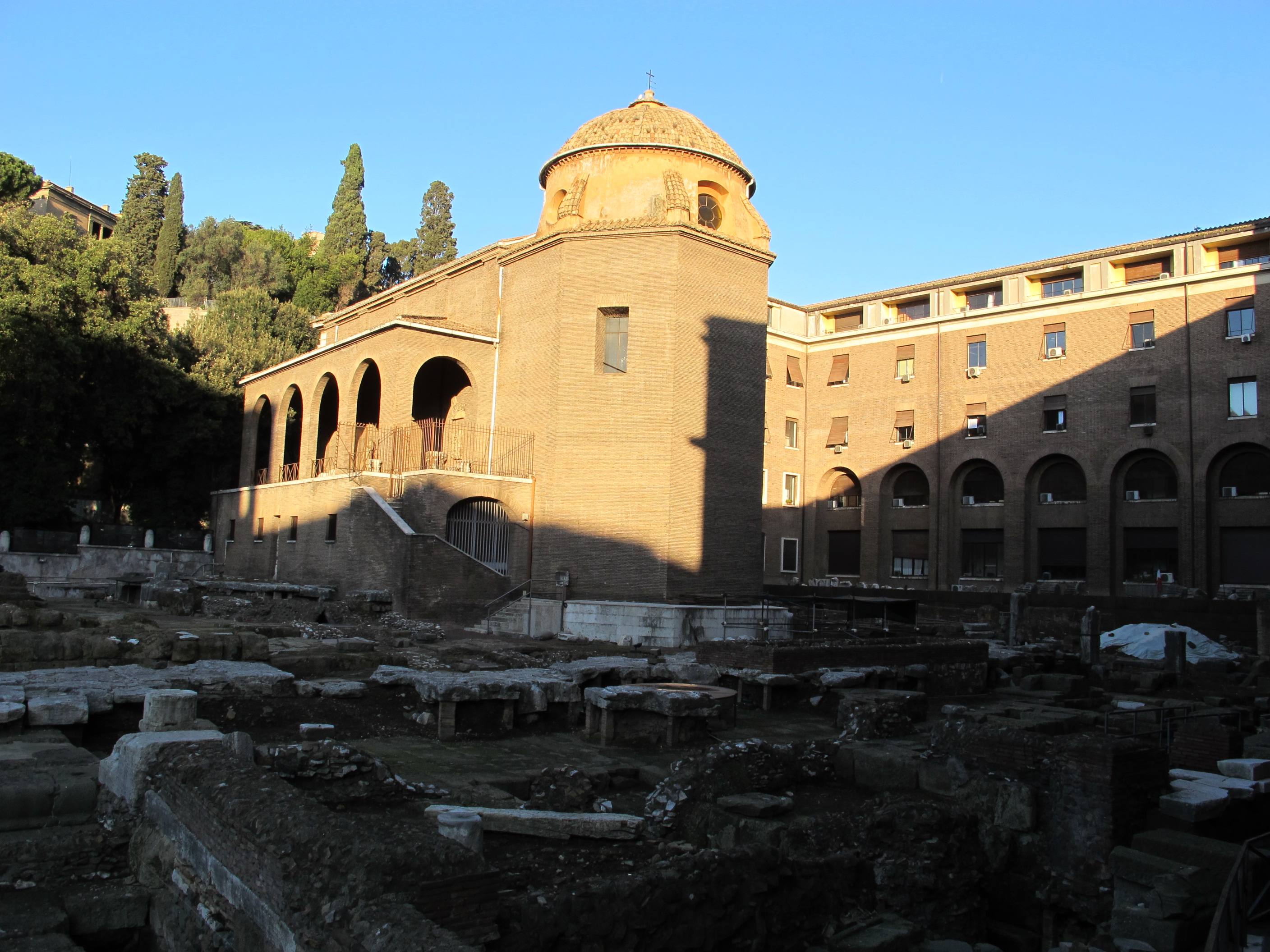 Area di sant'omobono